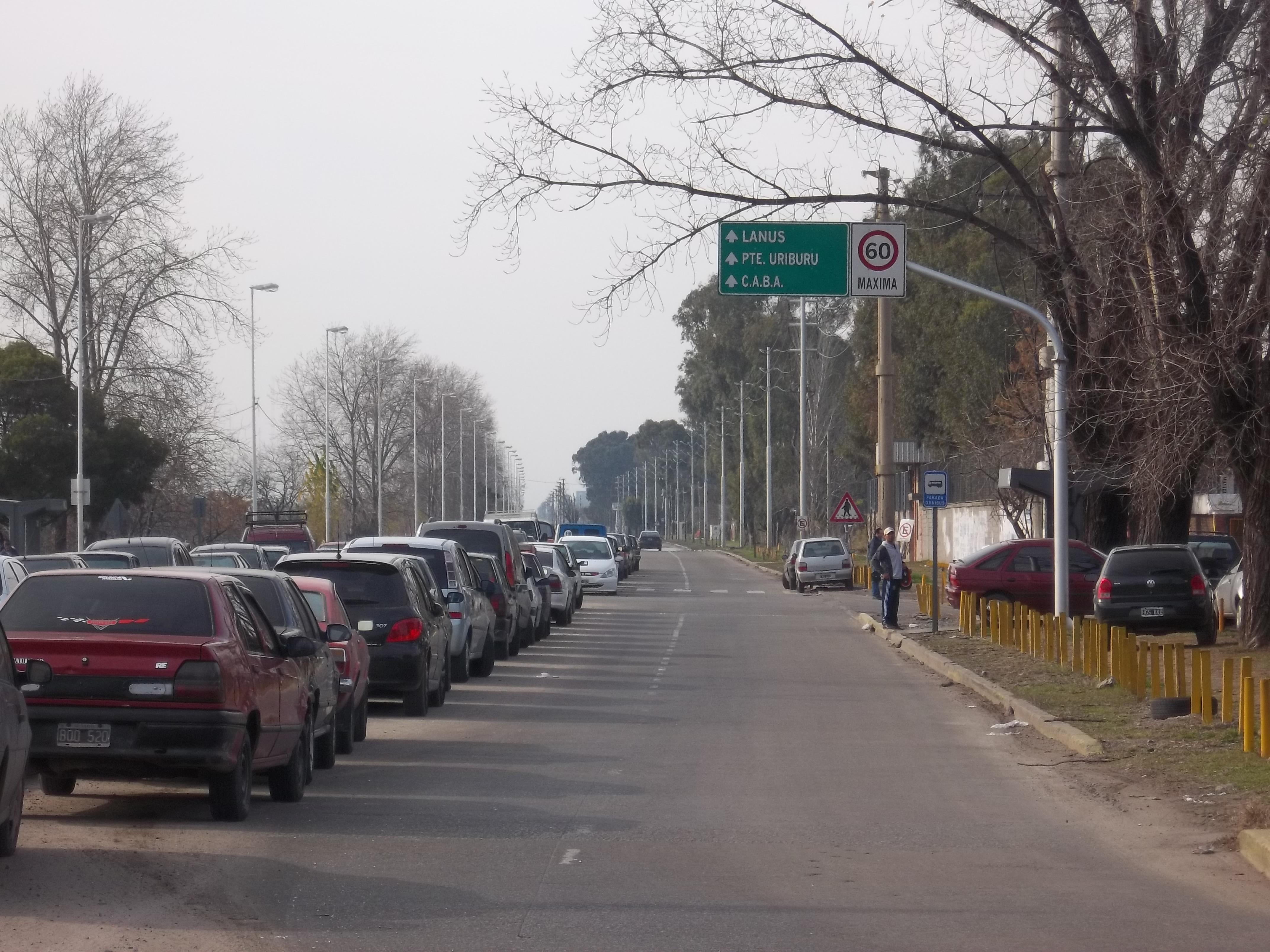 Camino de la Ribera Sur junto al Riachuelo en Villa Fiorito, partido de Lomas de Zamora, provincia de Buenos Aires, Argentina.